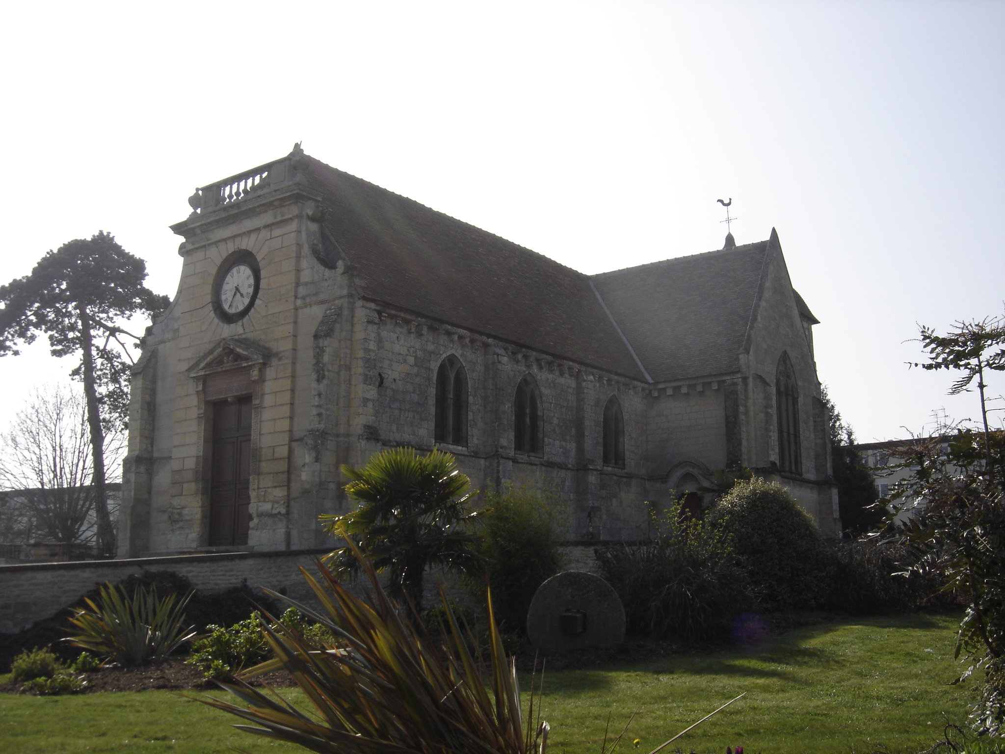 le portail principal de l'église est couronné de balustres